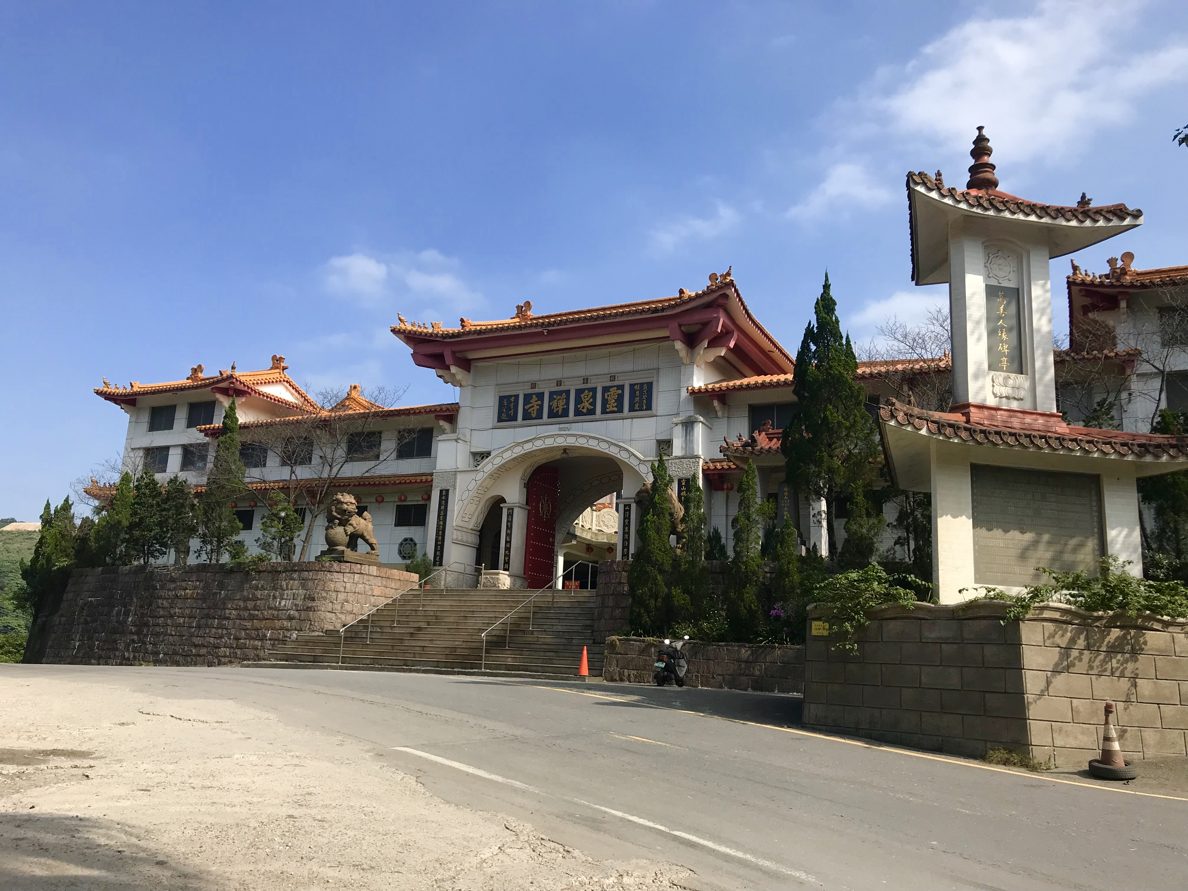 月眉山靈泉禪寺